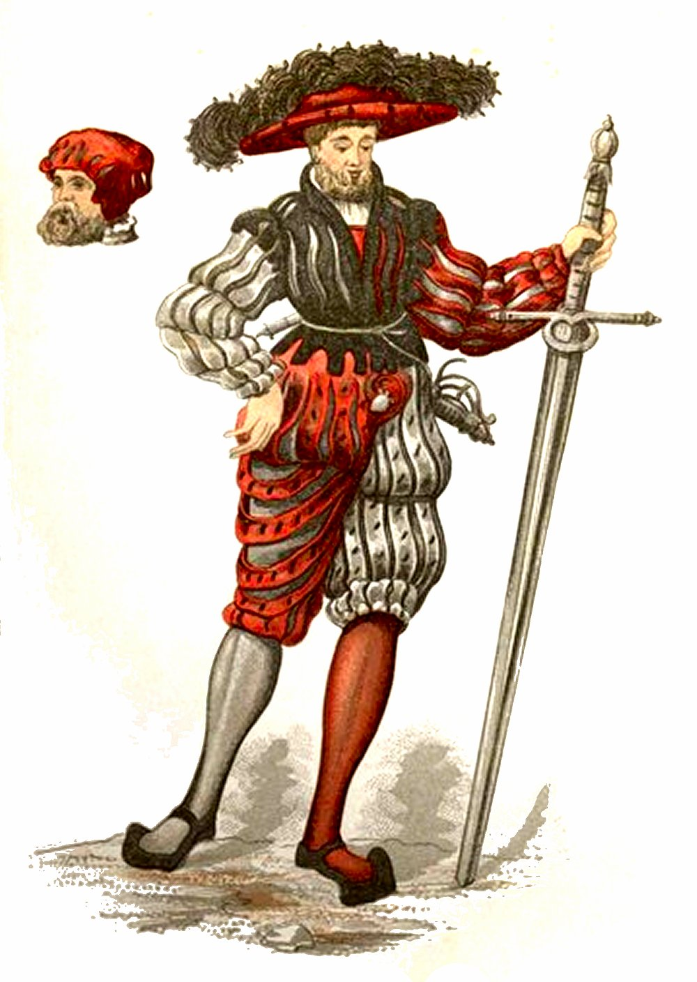 Häuptling in höfischer Tracht, aus dem 1561 begonnenen Hausbuchs des Unico Manninga, Häuptling zu Lütetsburg.